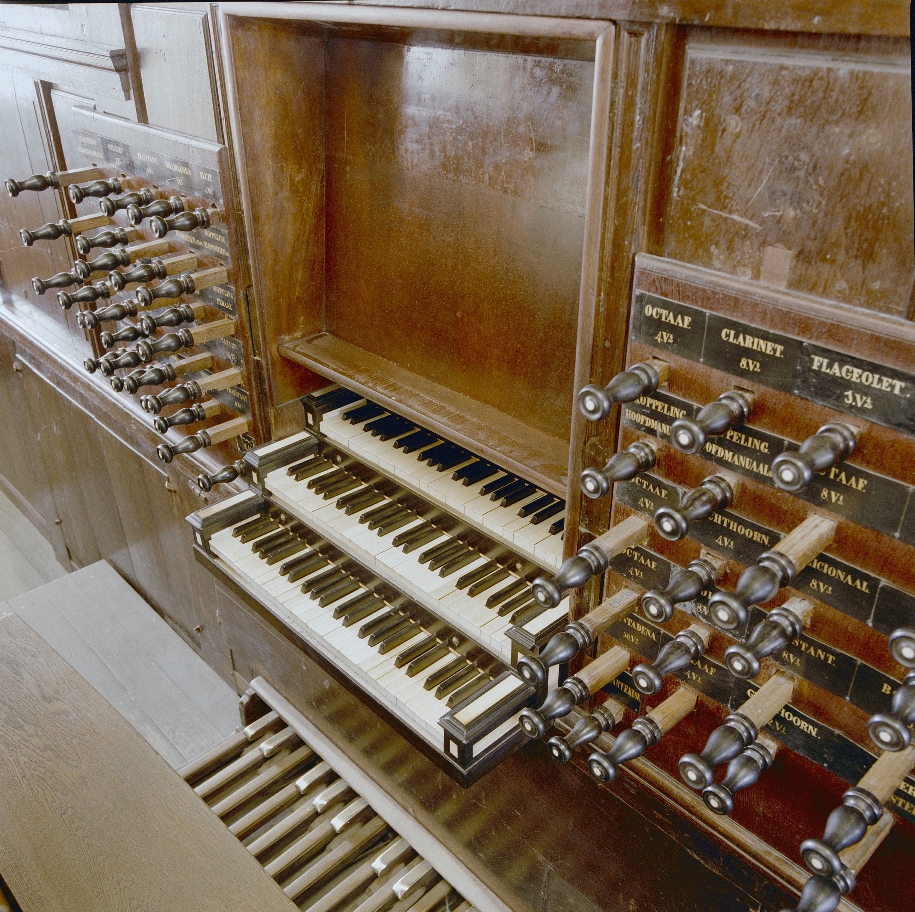 Der Aa-kerk: INTERIEUR, GROTE ORGEL, KLAVIATUUR